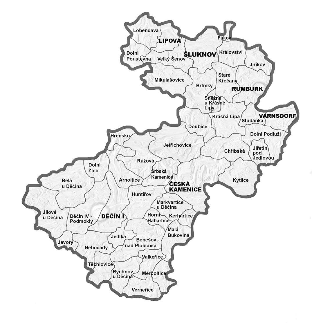 Diecéze litoměřická, děčínský vikariát - farnosti